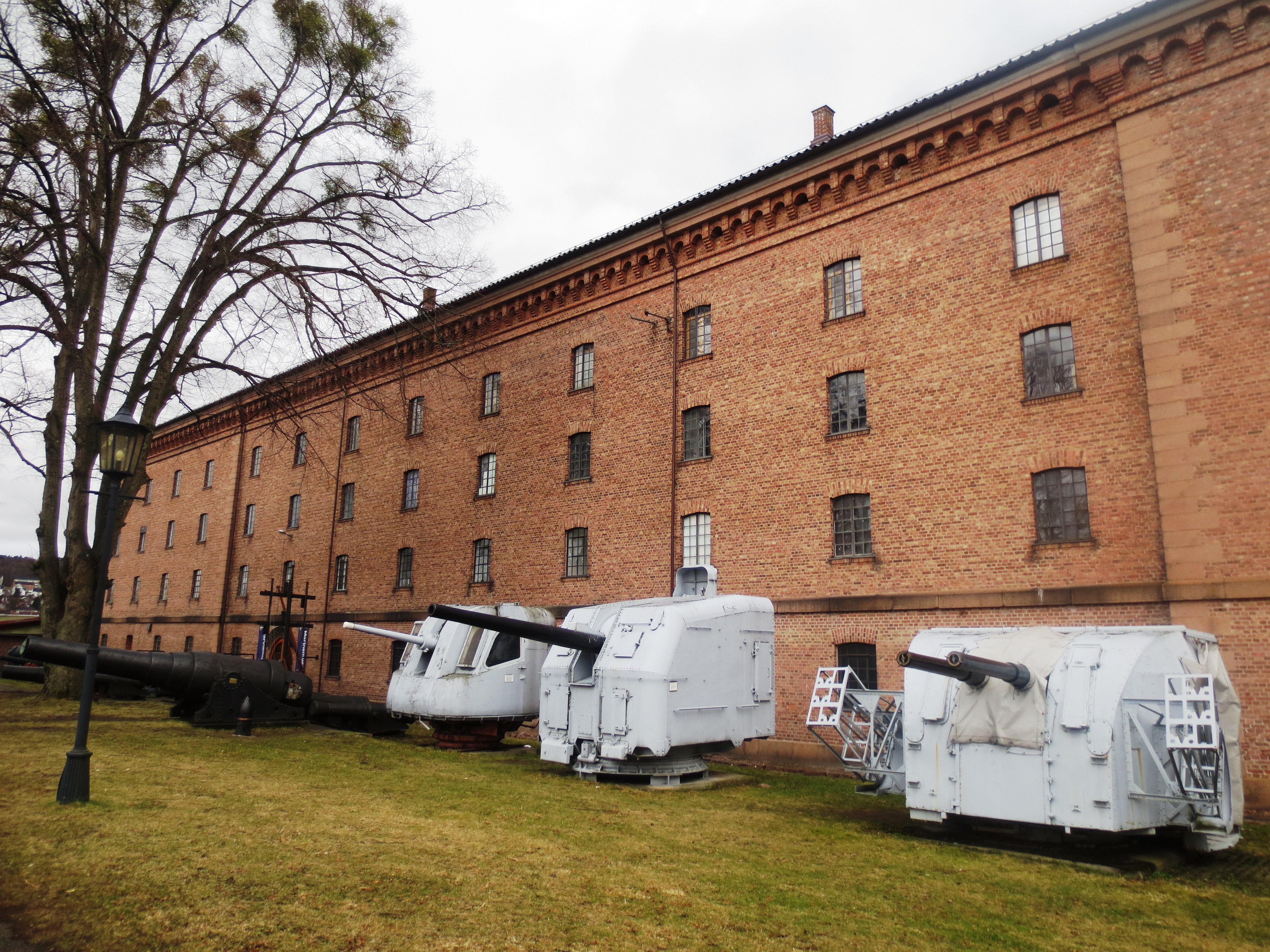 Marinemuseet, en del av Karljohansvern marineverft og festning